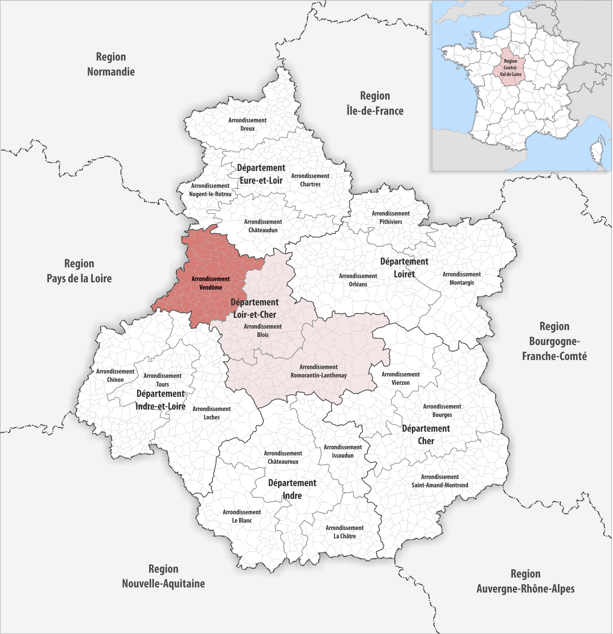 Lage des Arrondissements Vendôme